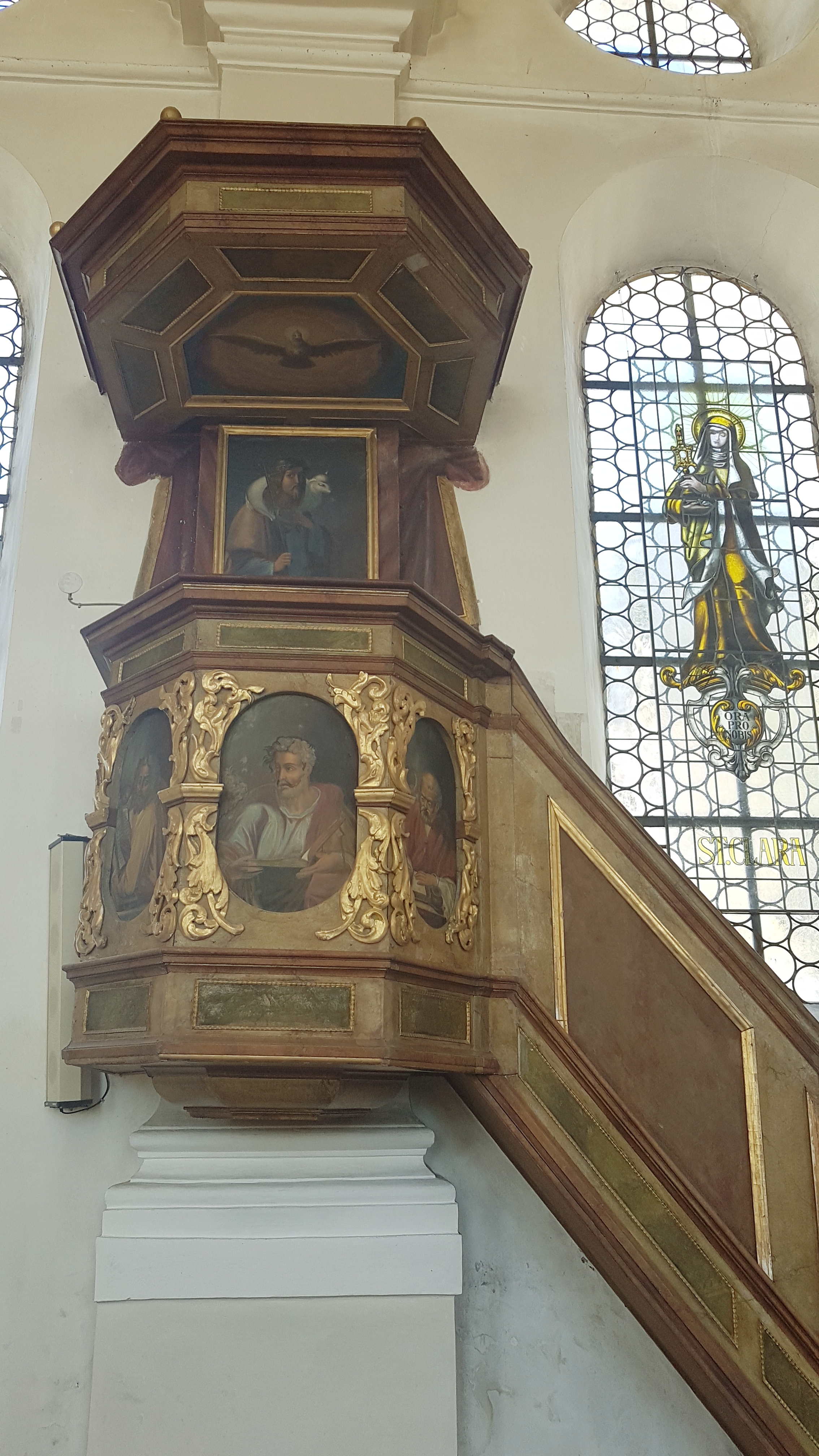 St. Georg (Pöring), Kanzel